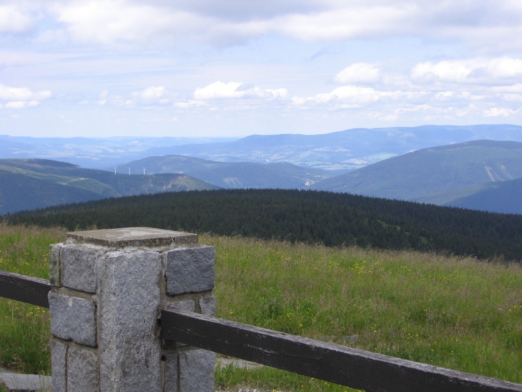 793 36 Malá Morávka, Czech Republic